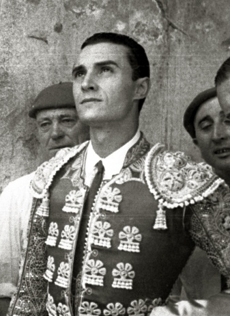 Título original: Corrida de toros en la plaza de 'El Txofre' (67/79) Localización: San Sebastián (Guipúzcoa)